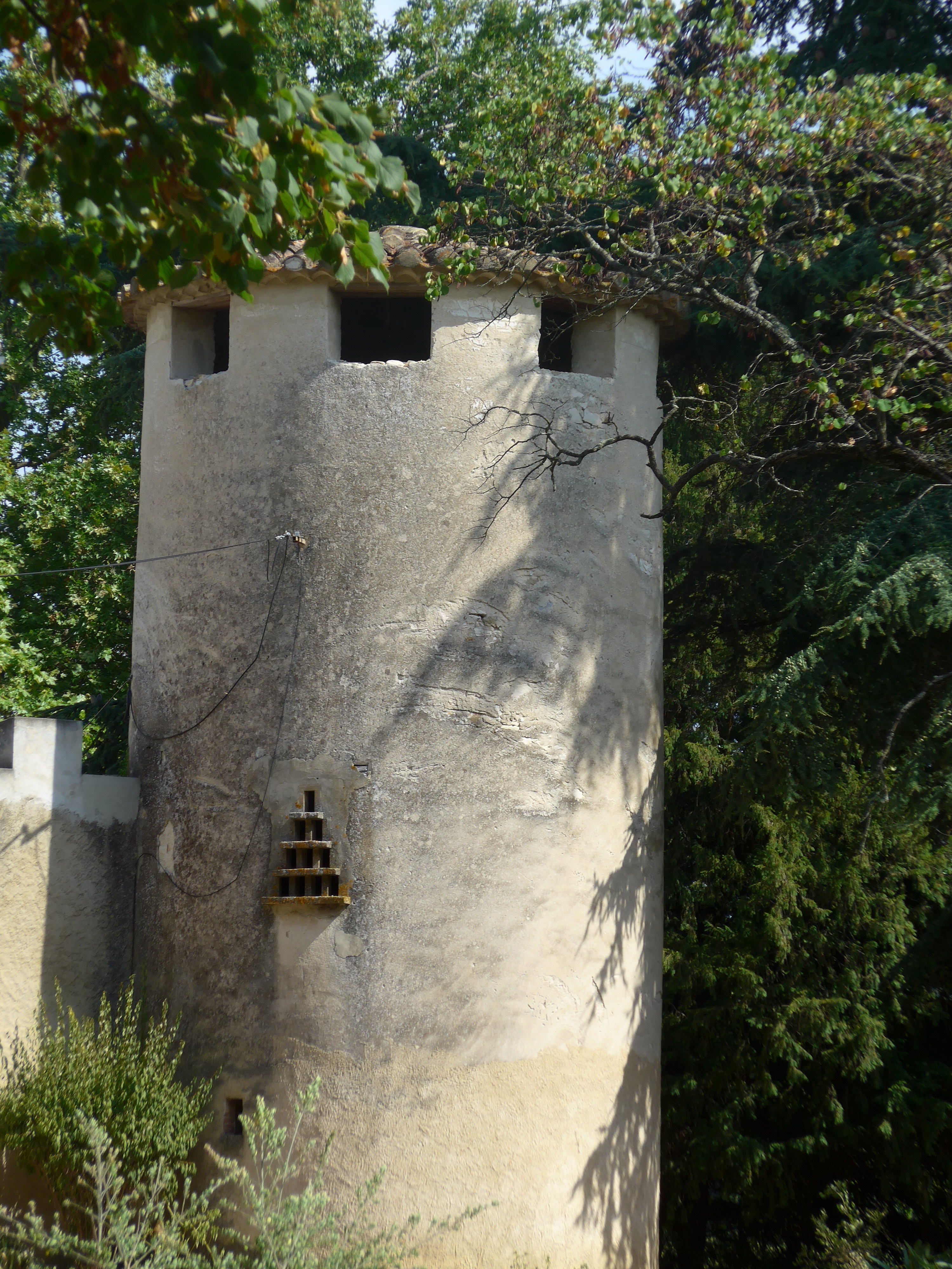 Espeluche (Drôme, France), château de Lalo.